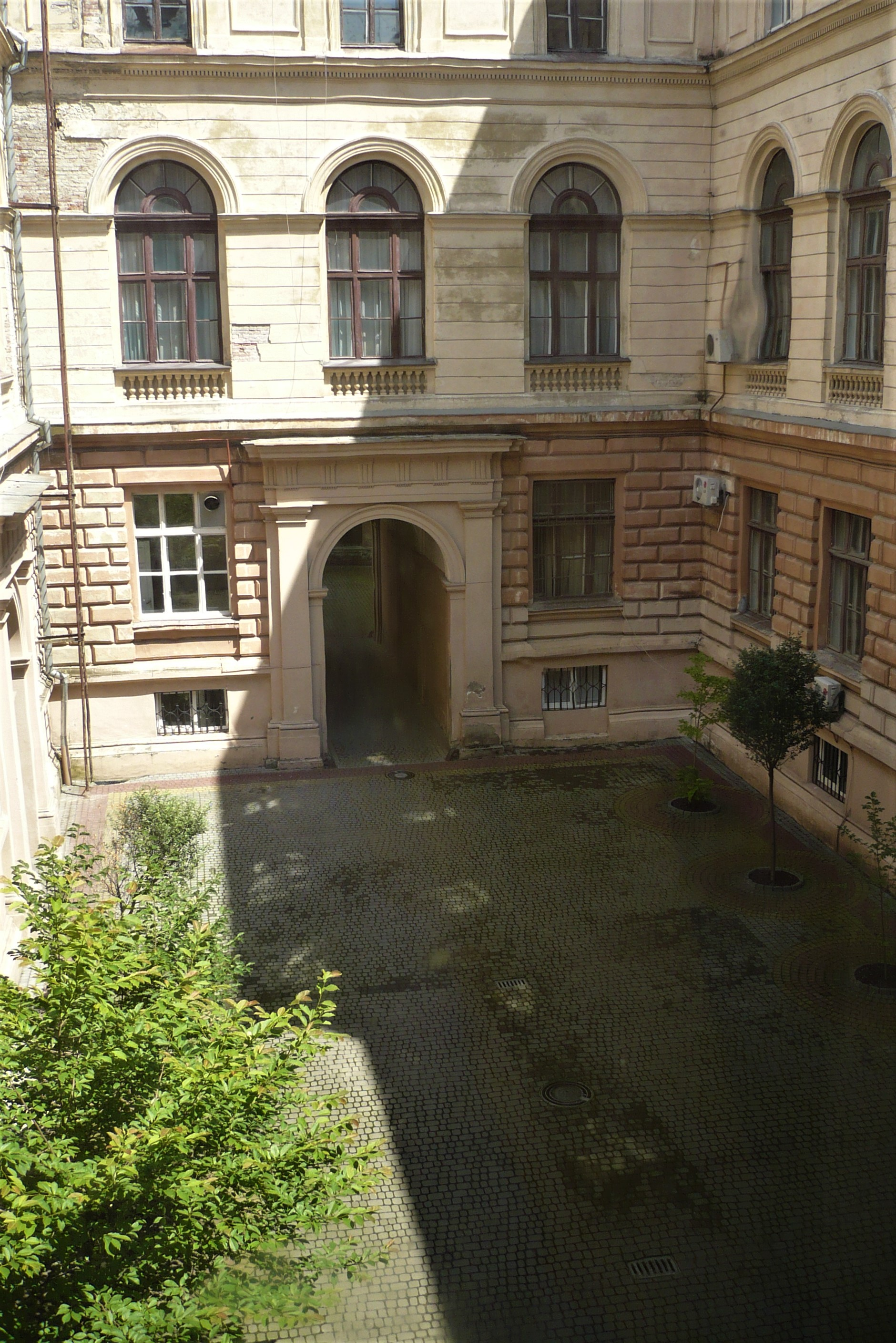 Lwowski Uniwersytet Narodowy im. Iwana Franki. Dziedziniec